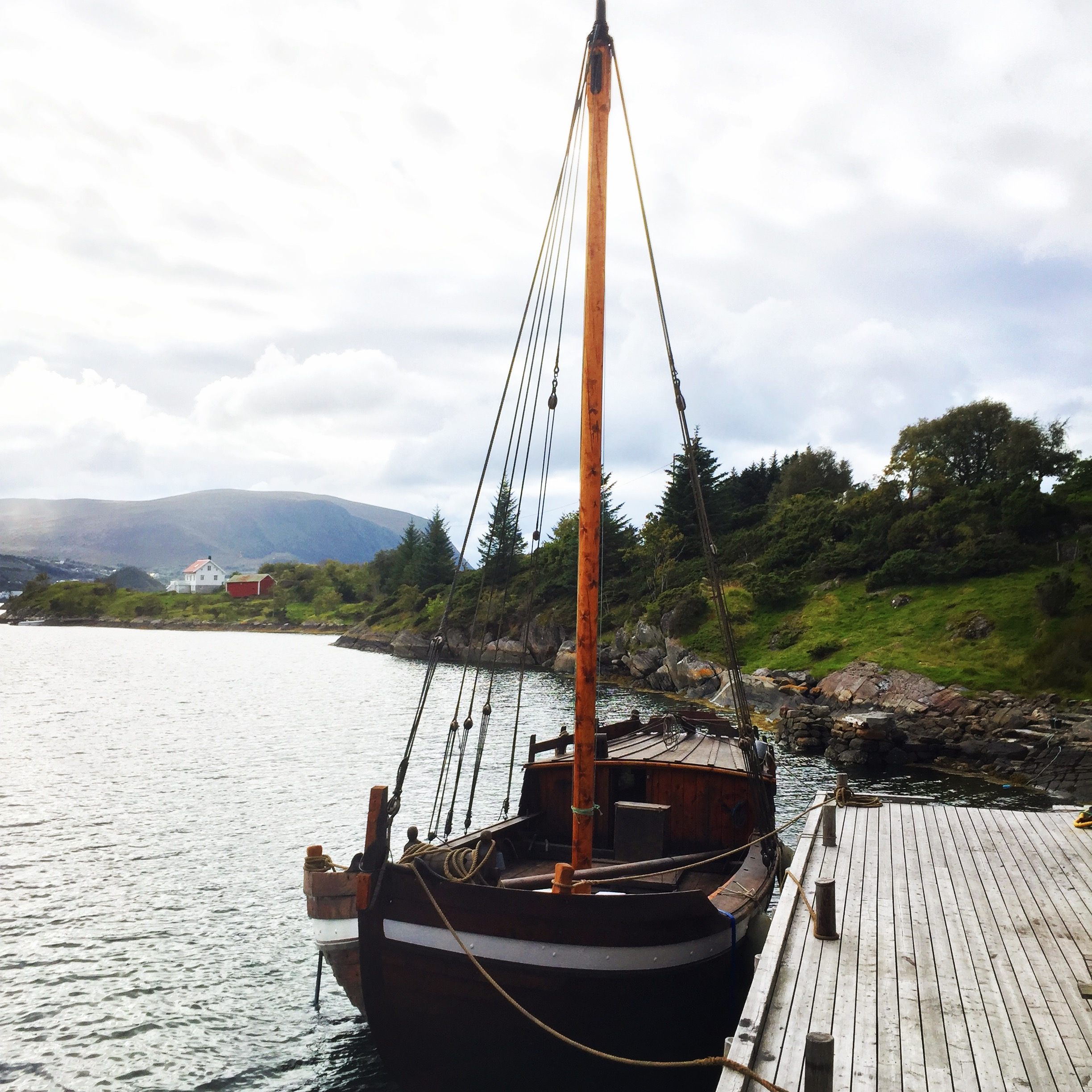 Anna Olava i heimehamn på Herøy gard